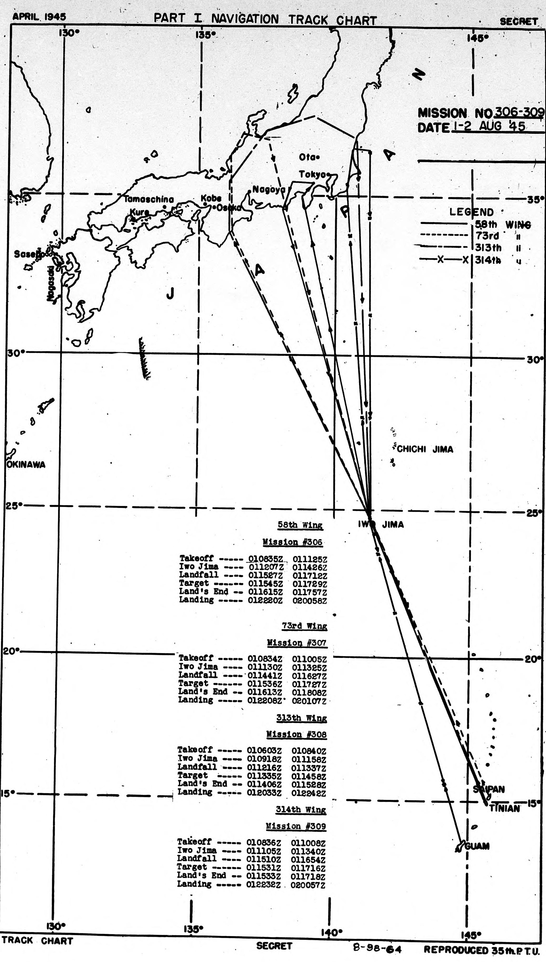 米機の予定航路